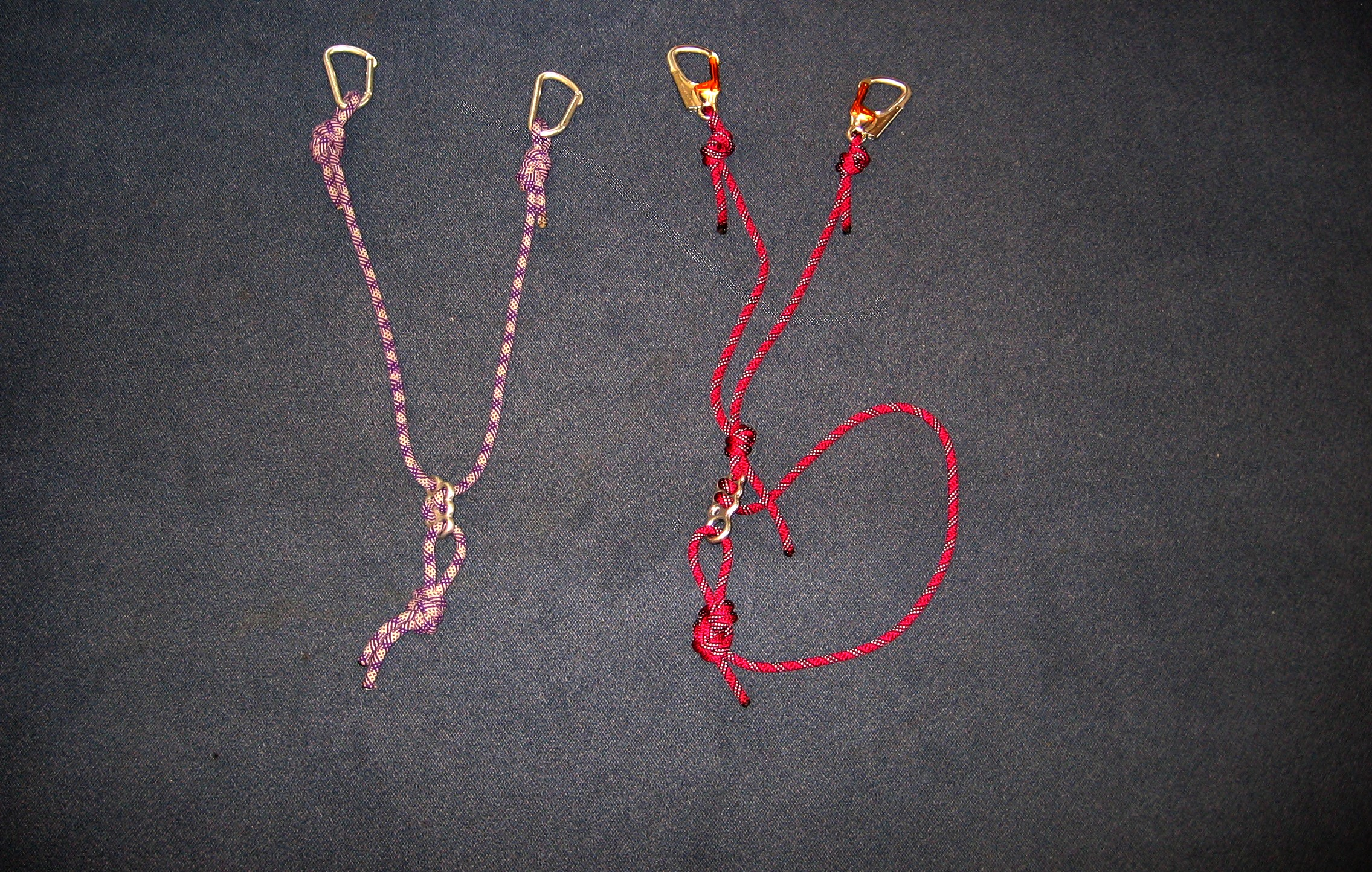 Geknotete Klettersteigsets, links in V-Form (veraltet), rechts in Y-Form